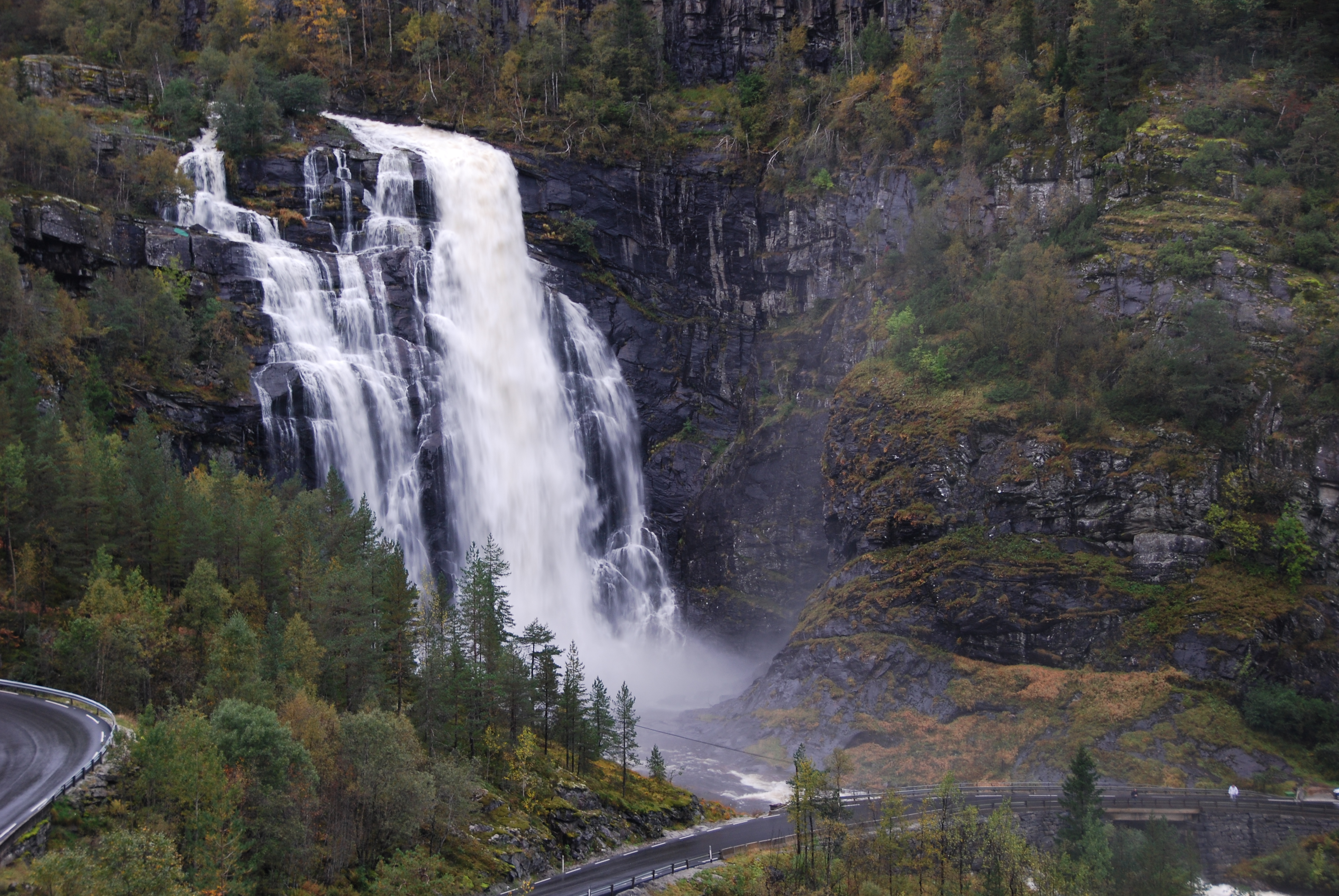 Skjervefossen